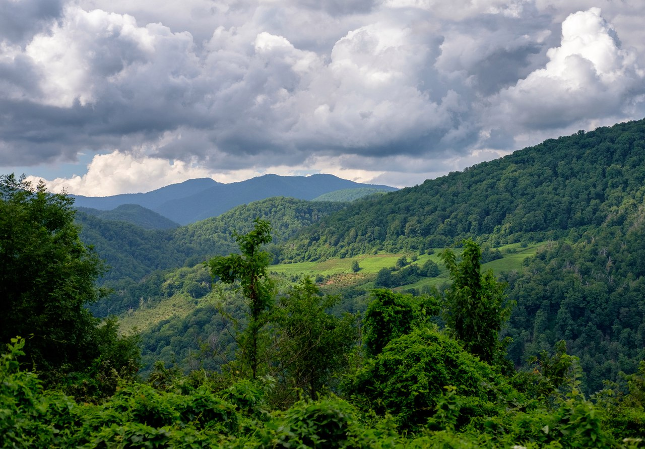 В районе заброшенного Бабук-аула